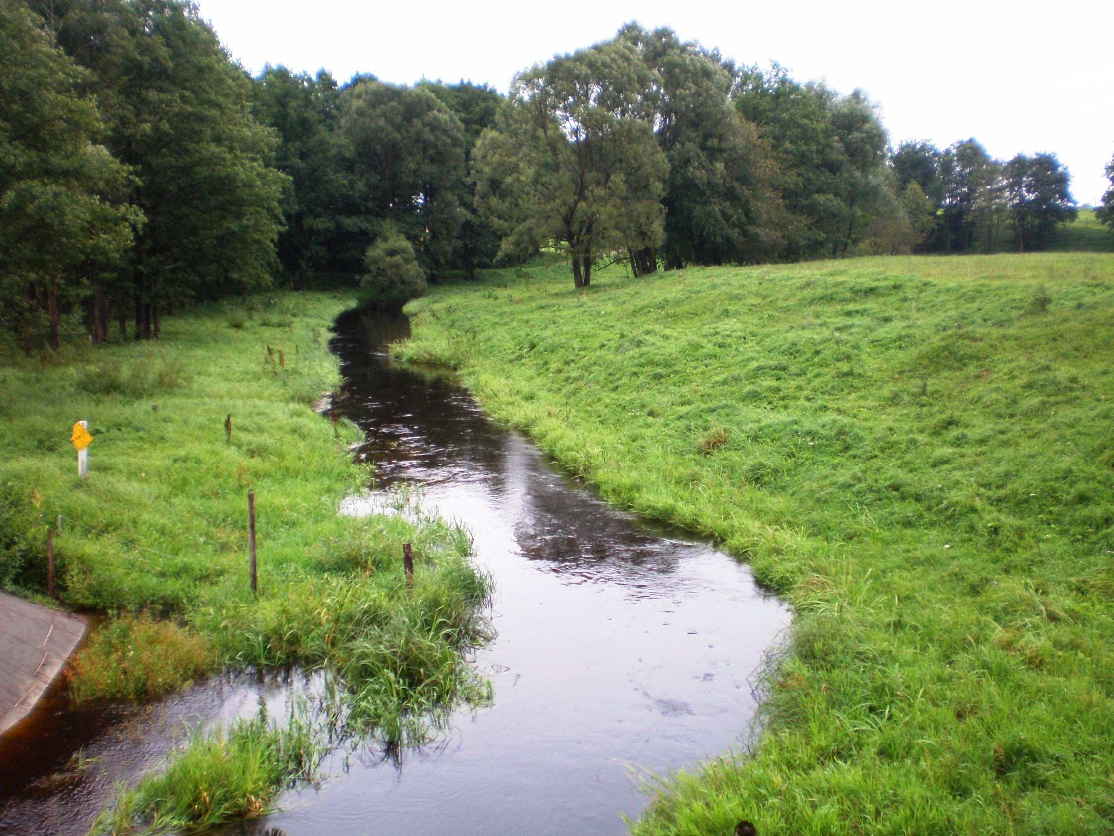 Šlavanta ties Šventragiu, Marijampolės sav.